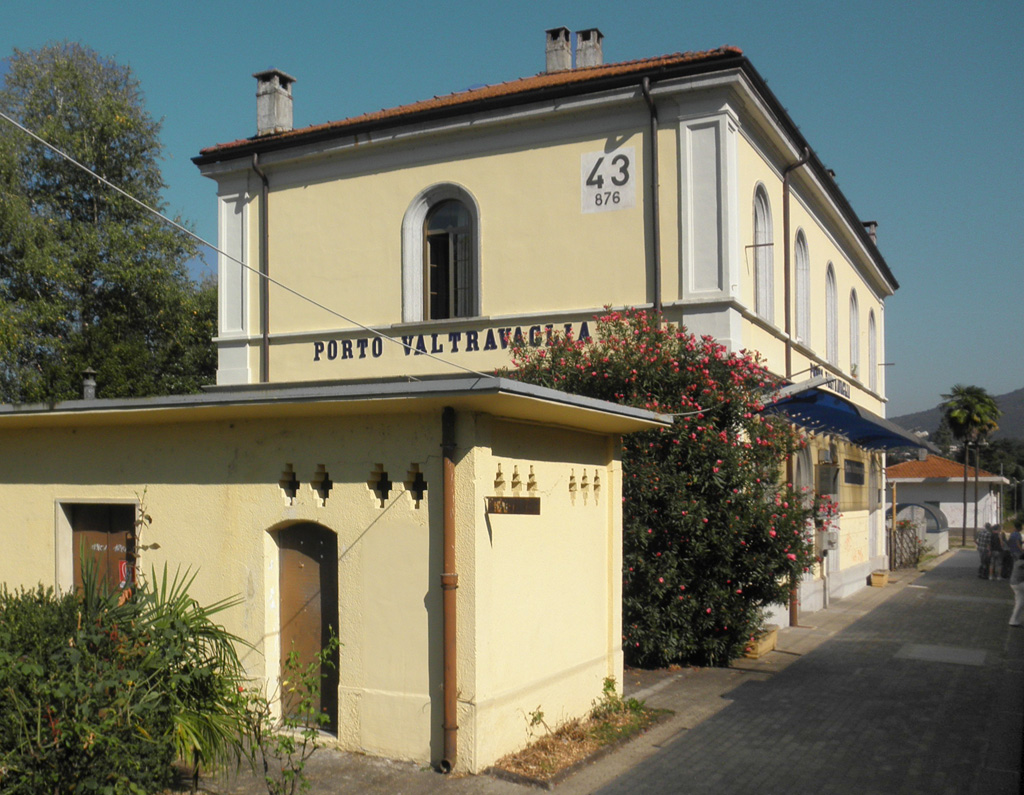 Stazione ferroviaria di Porto Valtravaglia